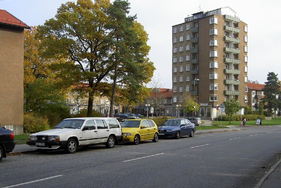 Solberga centrum i Älvsjö i Stockholm